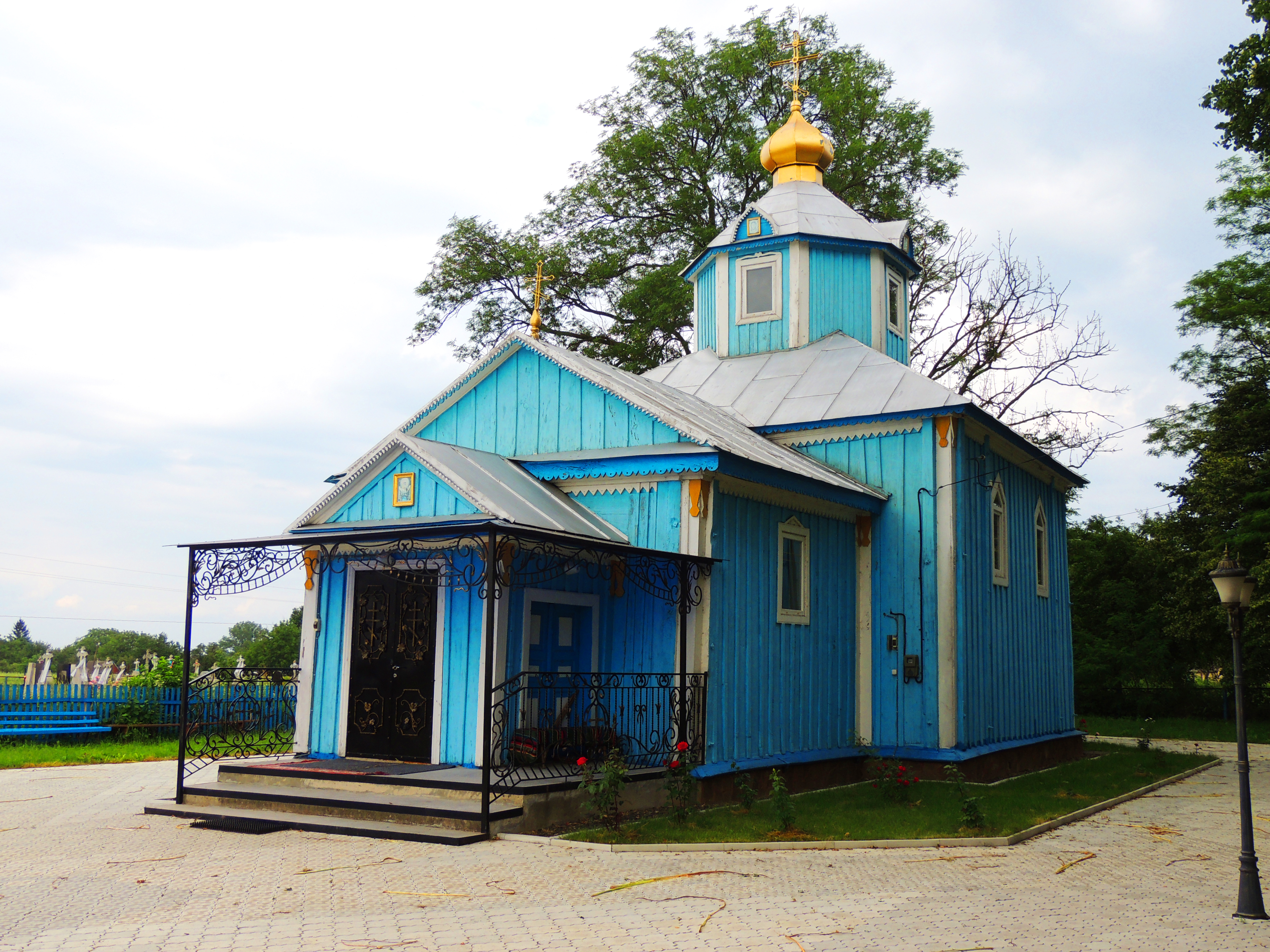 Свято-Покровська церква